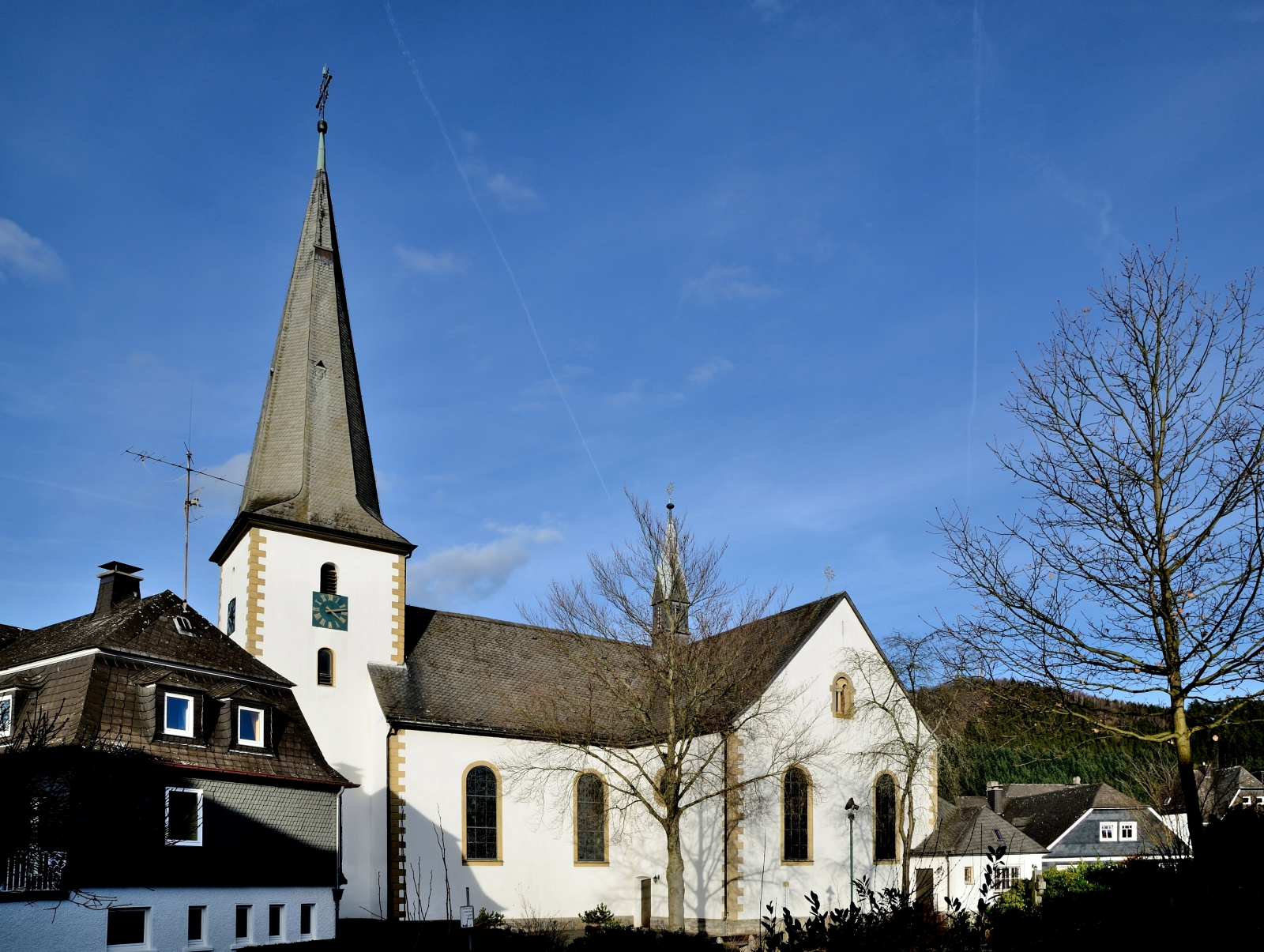 Kirche in Freienohl, Meschede im Hochsauerlandkreis, Nordrhein-Westfalen